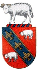 Brasão de Armas da familia Carneiro